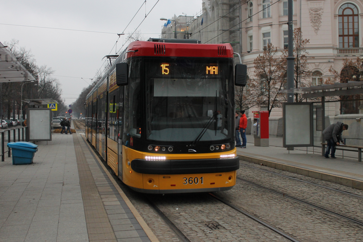 Tramwaj Pesa Jazz Duo 128N #3601 wjeżdża na przystanek Plac Politechniki.